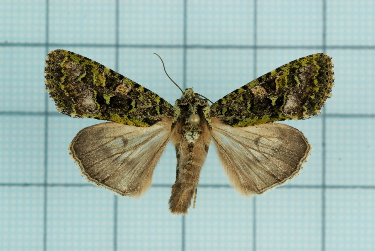 Euplexidia pallidivirens Yoshimoto 綠類錦夜蛾 鞍1:P.84,Pl.24-19 male